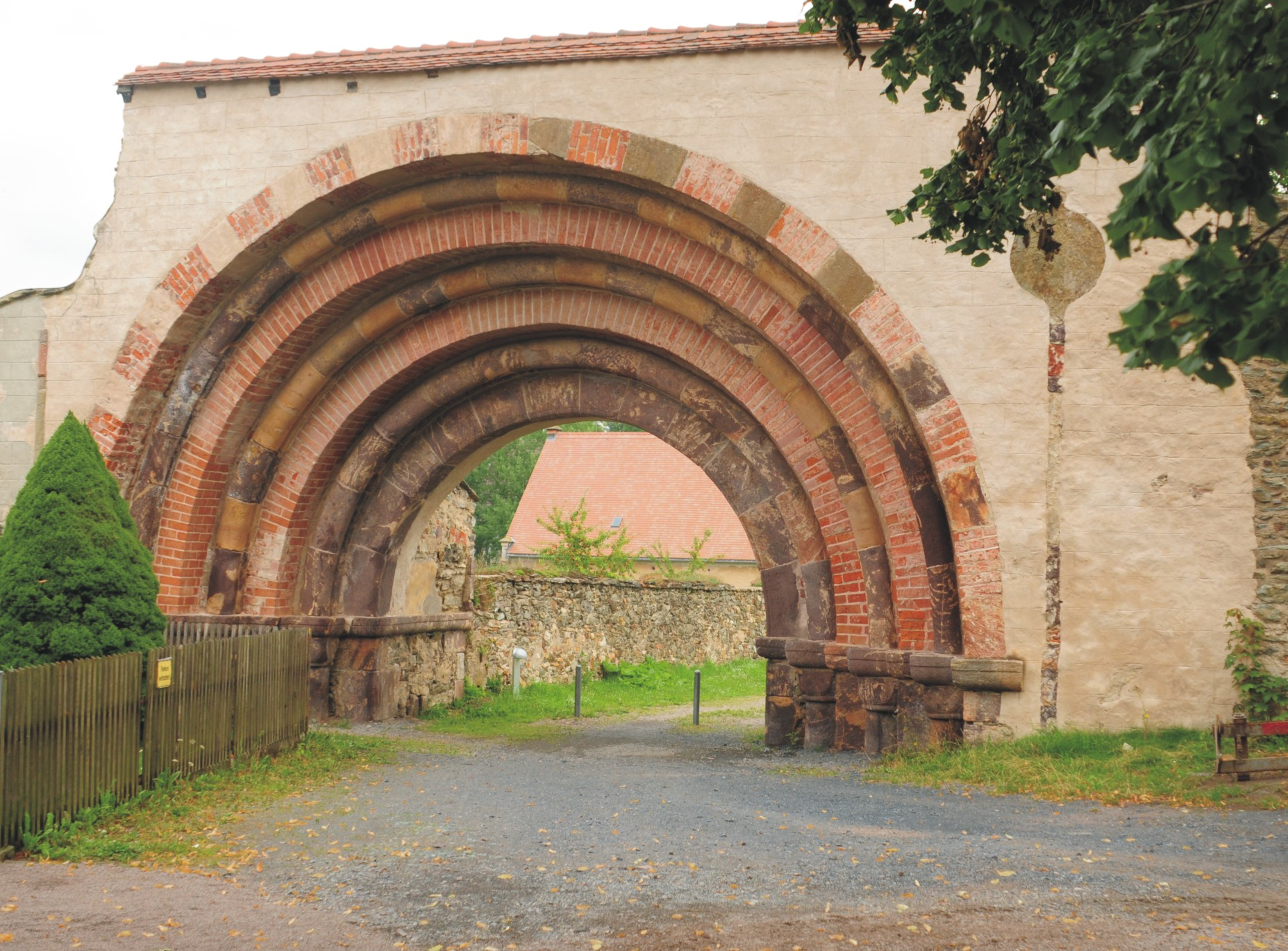 romanisches Stufenportal in der Klostermauer von Altzella (Sachsen, Deutschland)